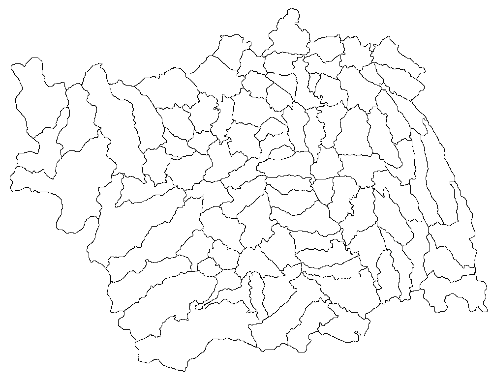 Categorie:Hărţi ale judeţului Bacău